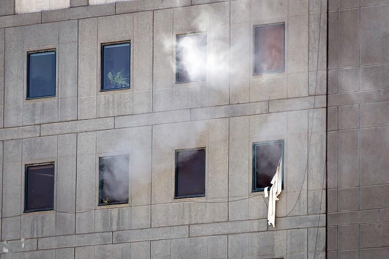 حمله تروریستی مجلس شورای اسلامی